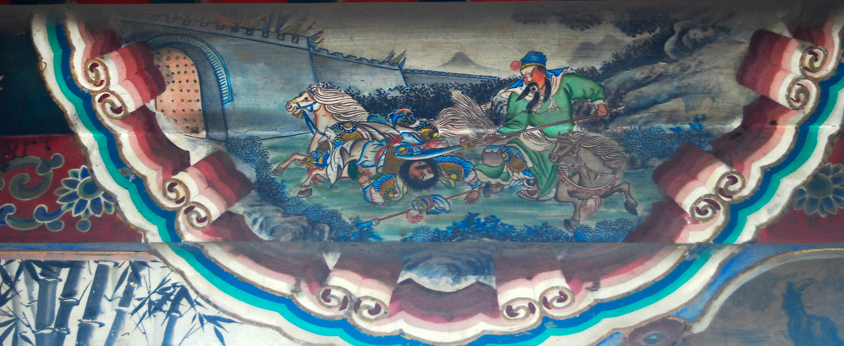 Quan Vũ chém Sái Dương, anh em hòa giải - Di Hòa Viên